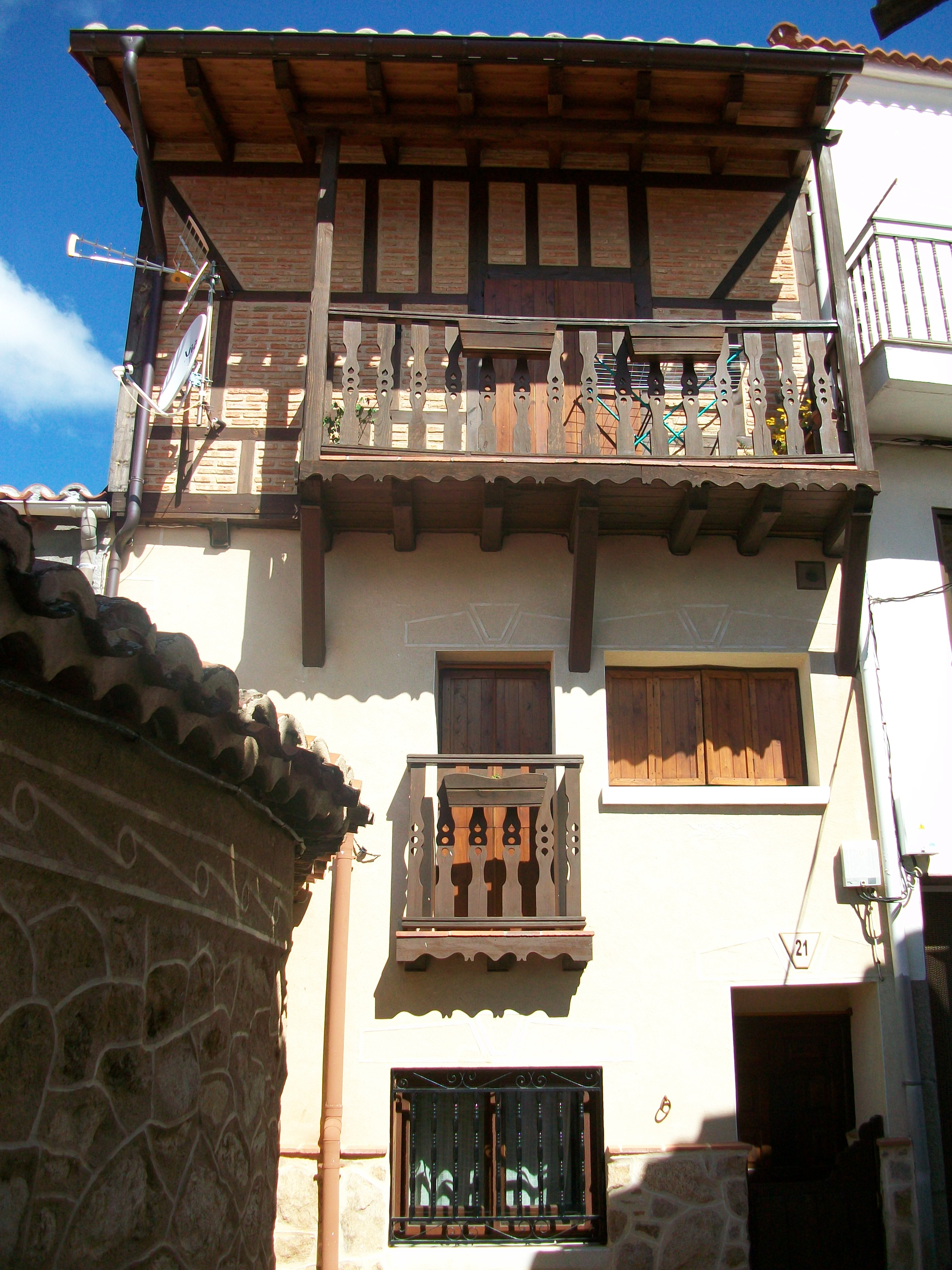 Casa en la calle Vinculada, en Barrado